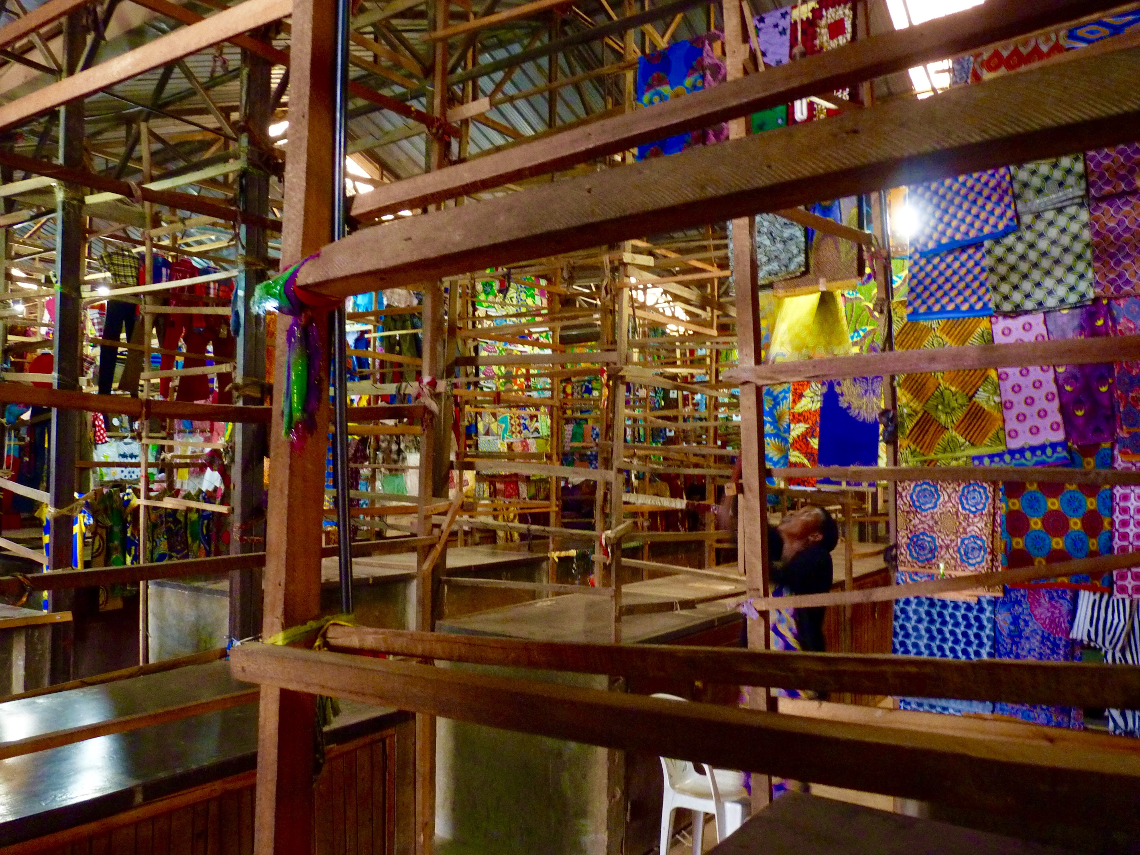 Marché de tissus à Kigali This is an image of Cultural Fashion or Adornment from Rwanda